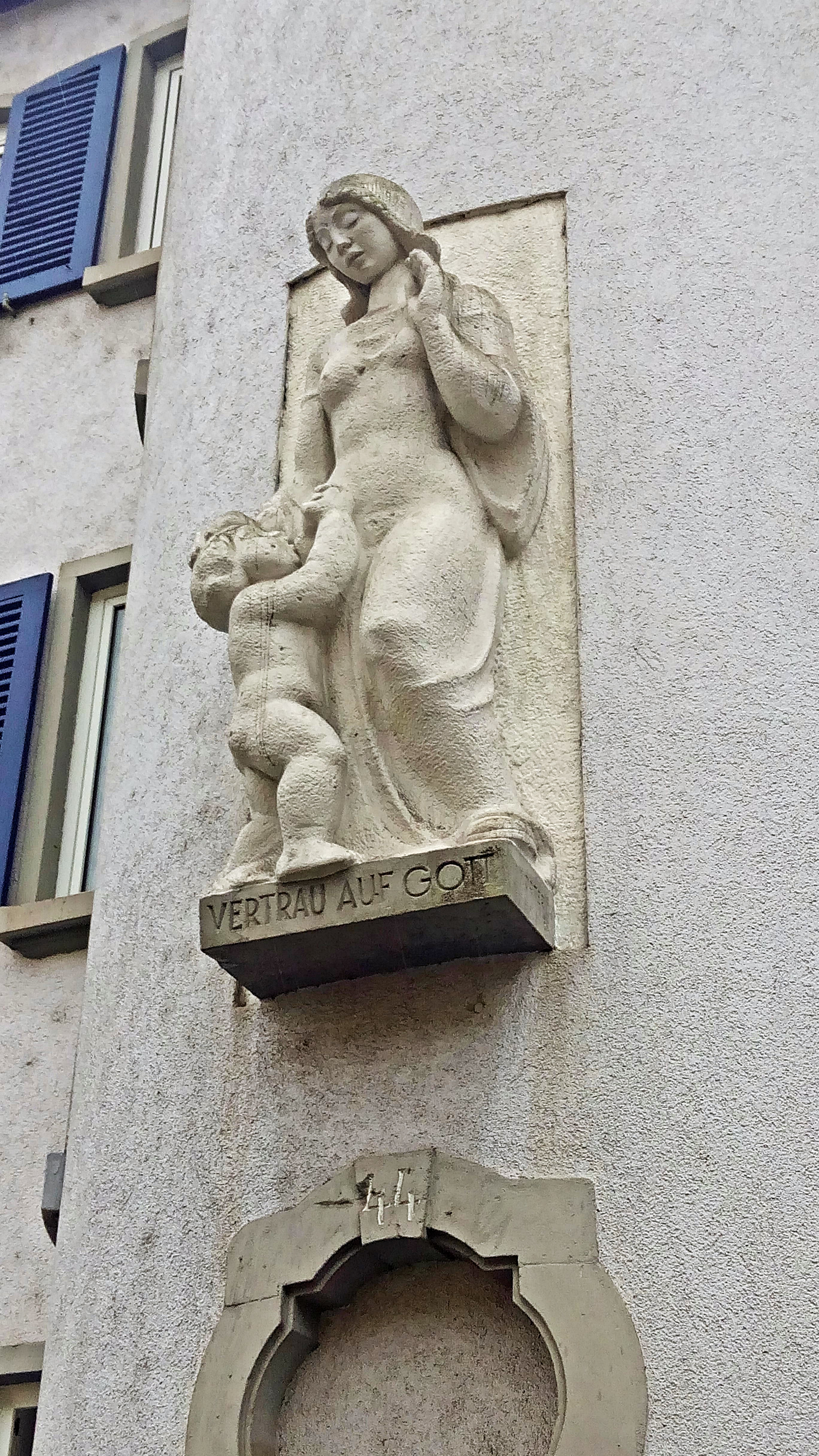 Neustadt/Weinstraße, Friedrich-Ebert-Str. 44, Figurengruppe "Vertrau auf Gott", signiert (Fritz Korter, 1936)